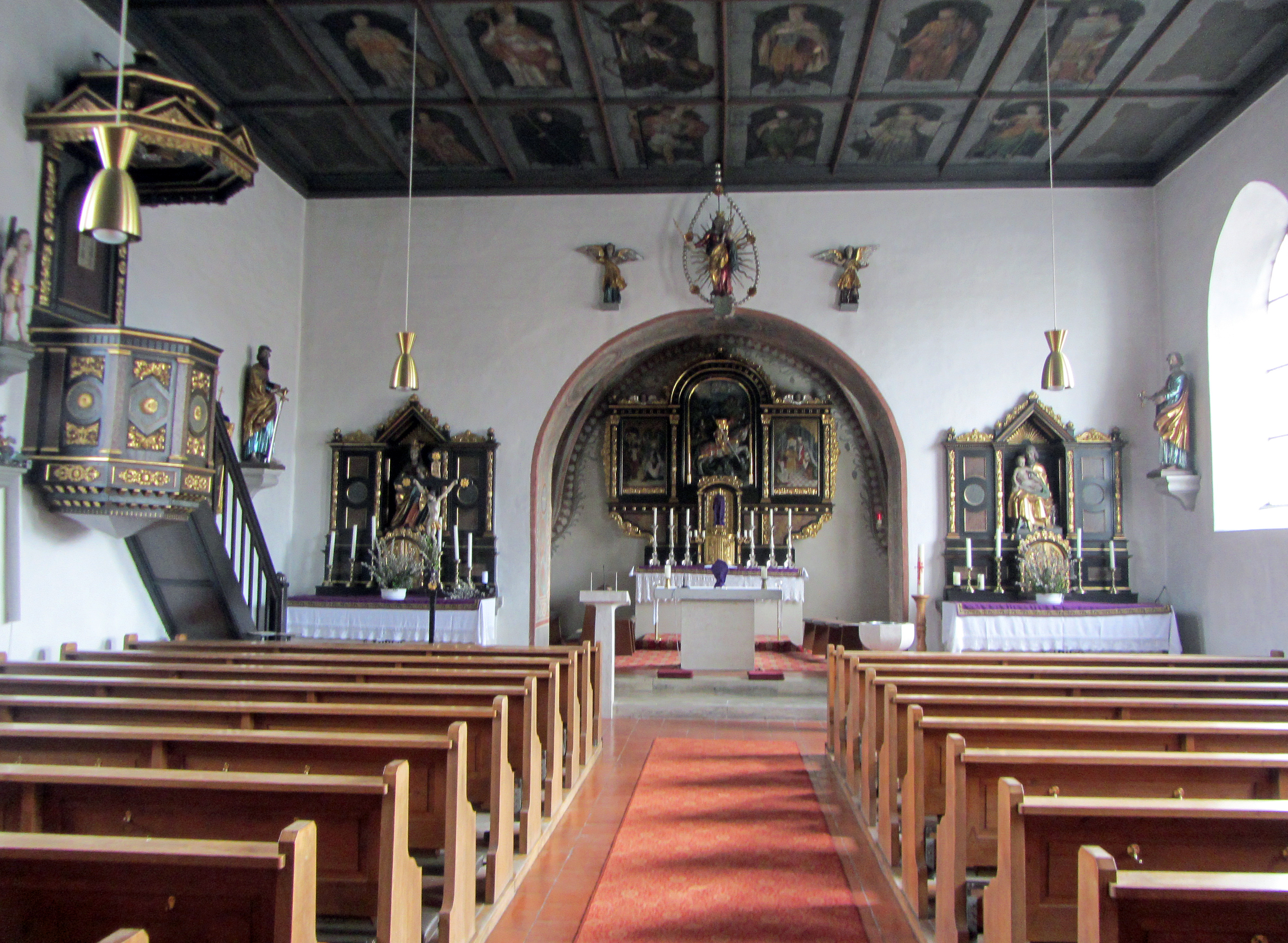 Baudenkmal D-1-85-131-1